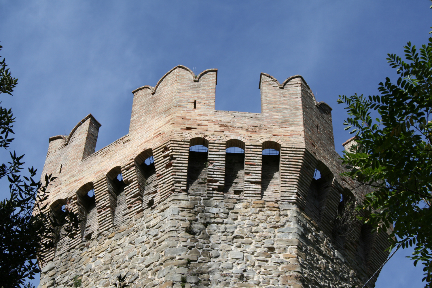 Particolare dell'opera in aggetto presente alla sommità del torrione a pianta esagonale della Rocca di Arquata del Tronto, in provincia di Ascoli Piceno.